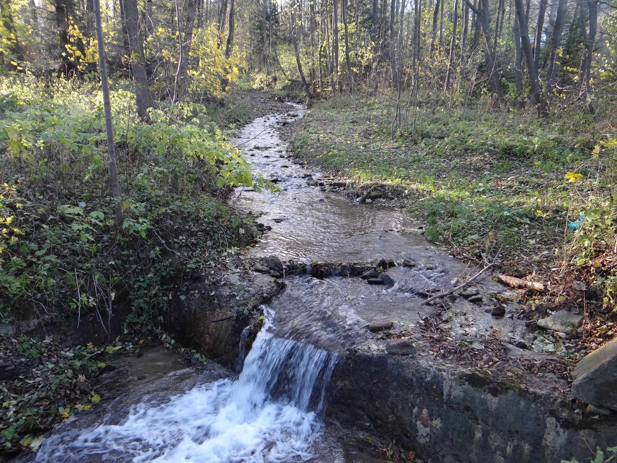 Ciśniawa przy skansenie w Sidzinie